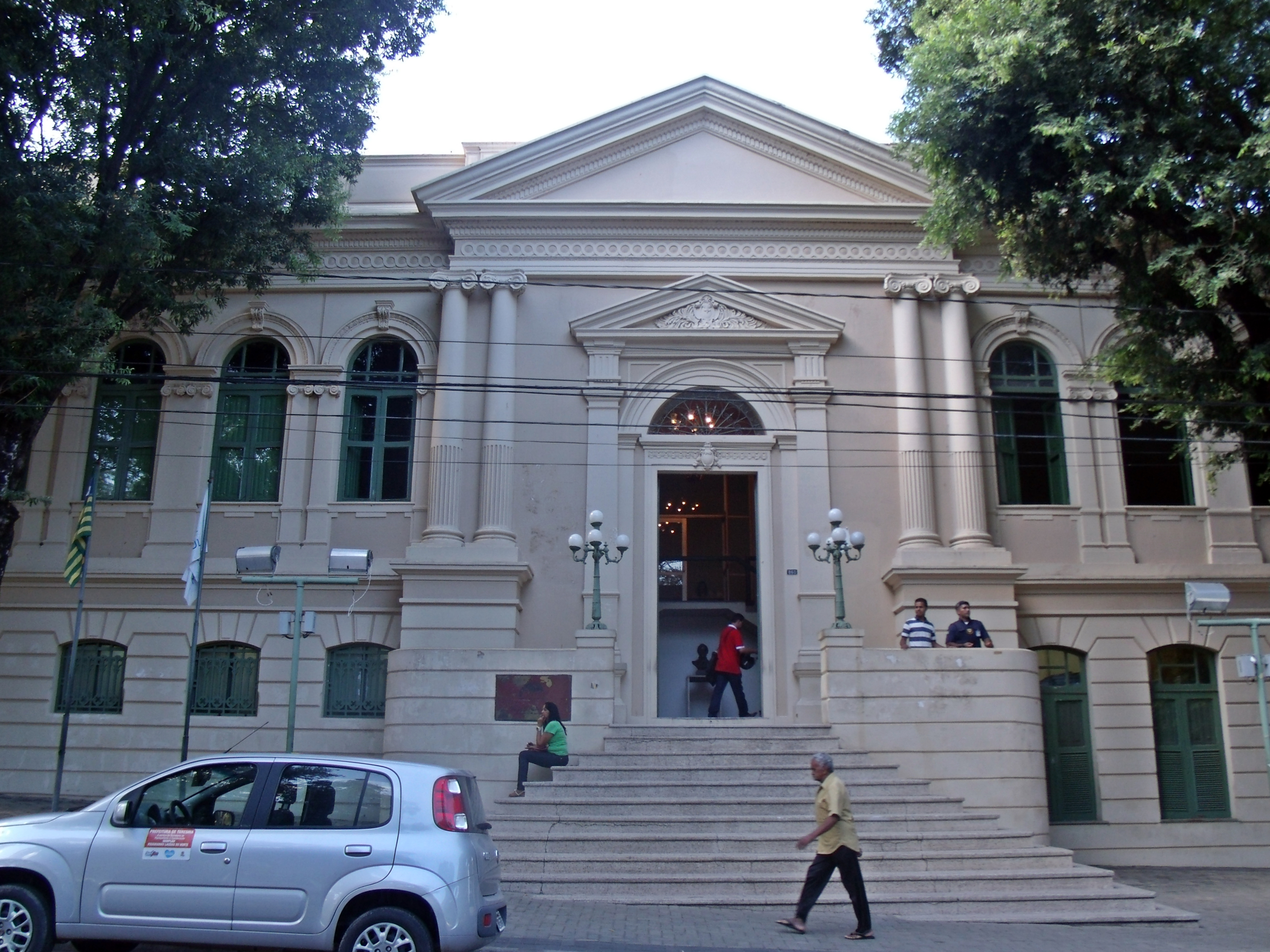 Fachada principal do Palácio da Cidade em Teresina.